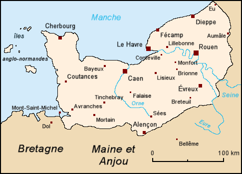 carte de la Normandie historique, avec villes principales du XIIe siècle.